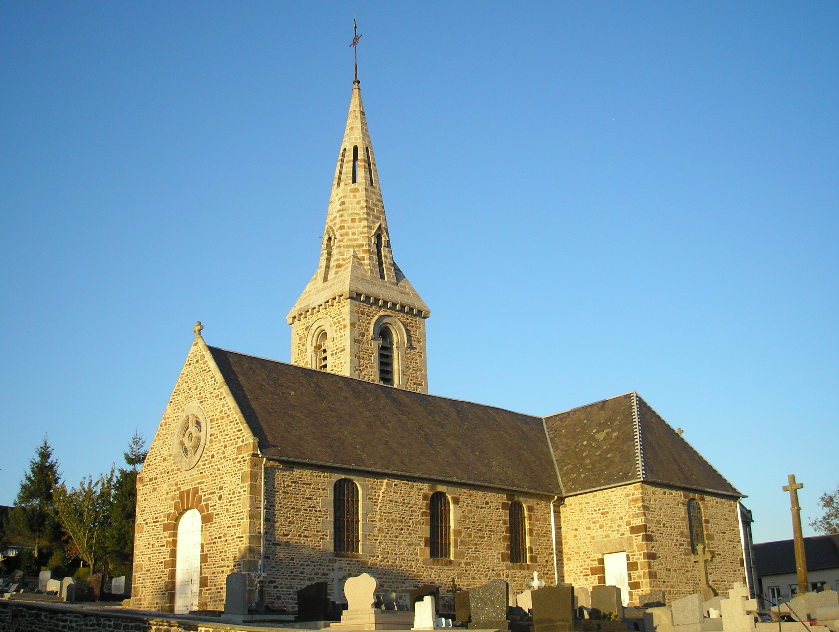 Le Petit-Celland (Normandie, France). L'église Saint-Ouen.